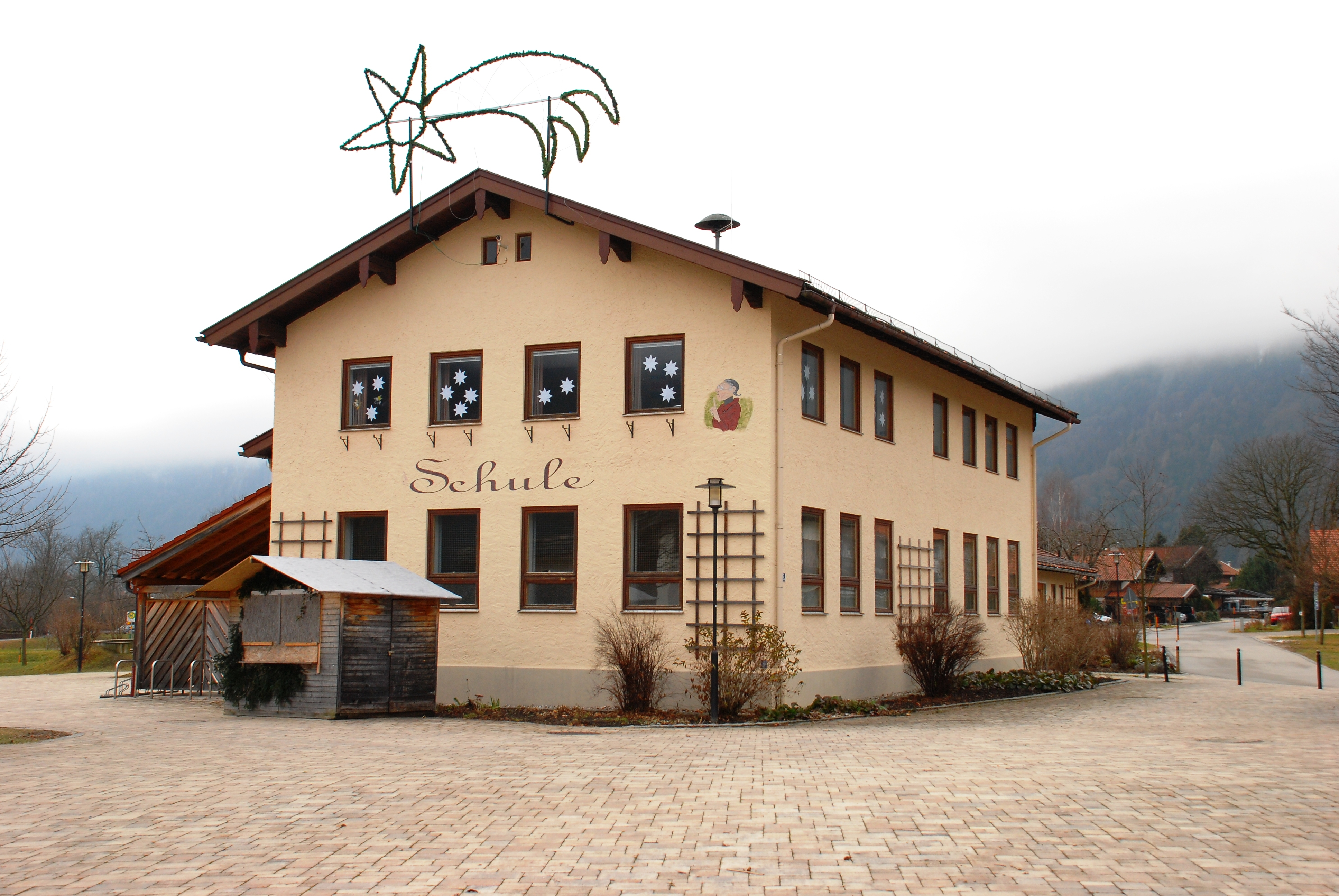 Schulhaus von Schleching, Landkreis Traunstein, Regierungsbezirk Oberbayern, Bayern.